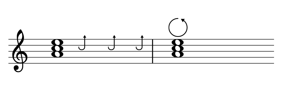 Handbell echo and gyro techniques notation